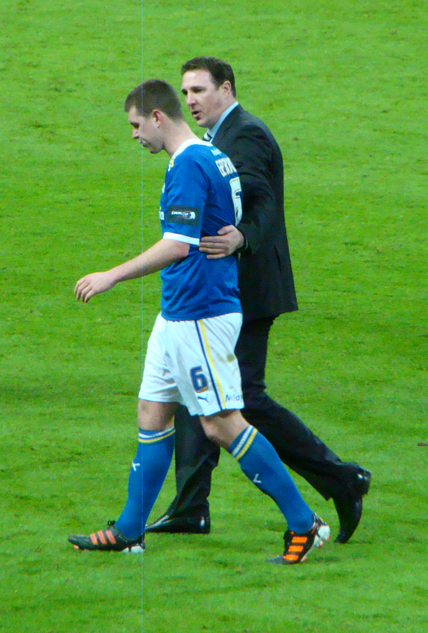 Malky Mackay console Anthony Gerrard (Cardiff City) après son tir au but raté lors de la finale de Carlind Cup Cardiff City-Liverppol, 26 février 2012